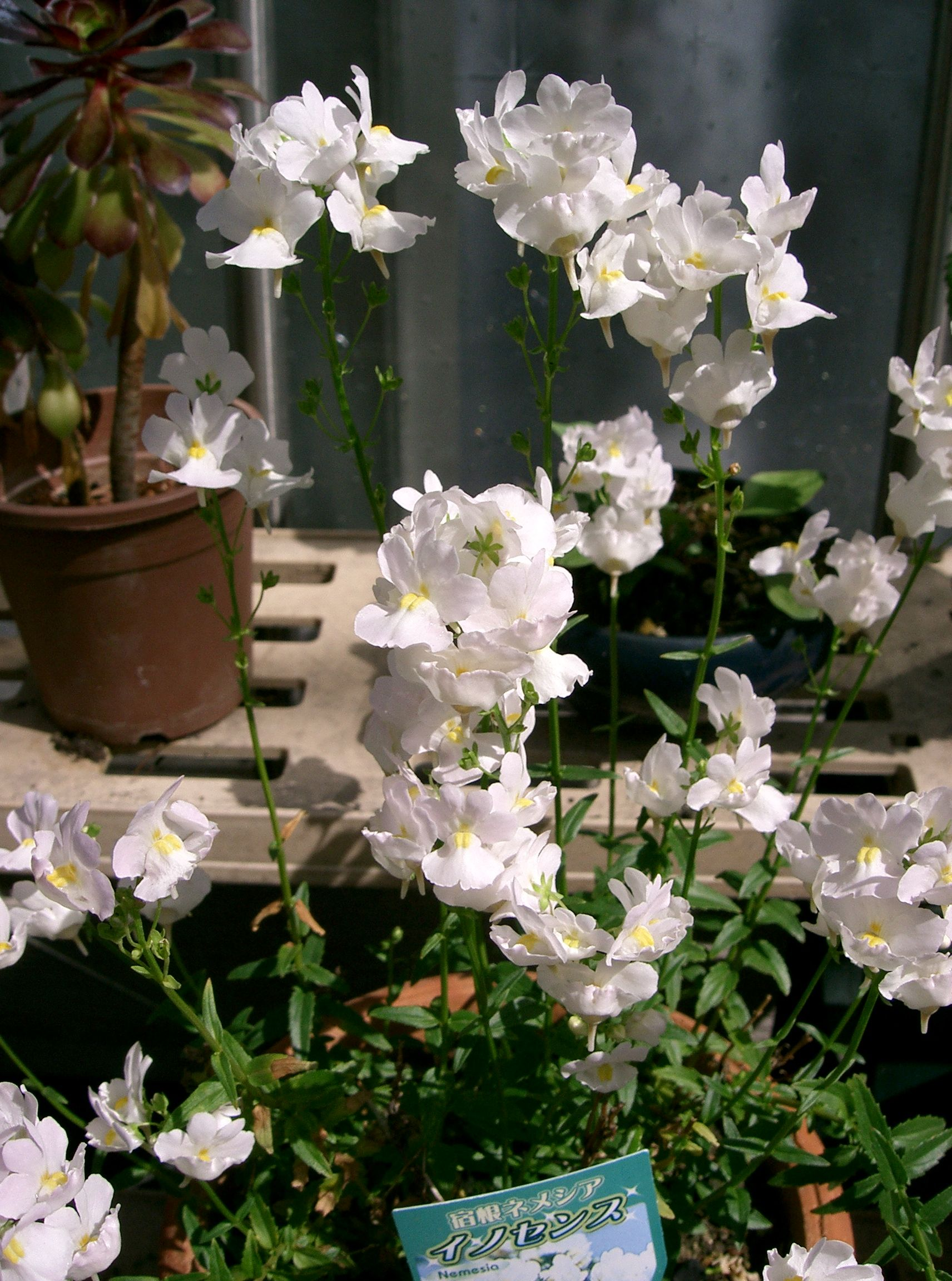 Nemesia sp.